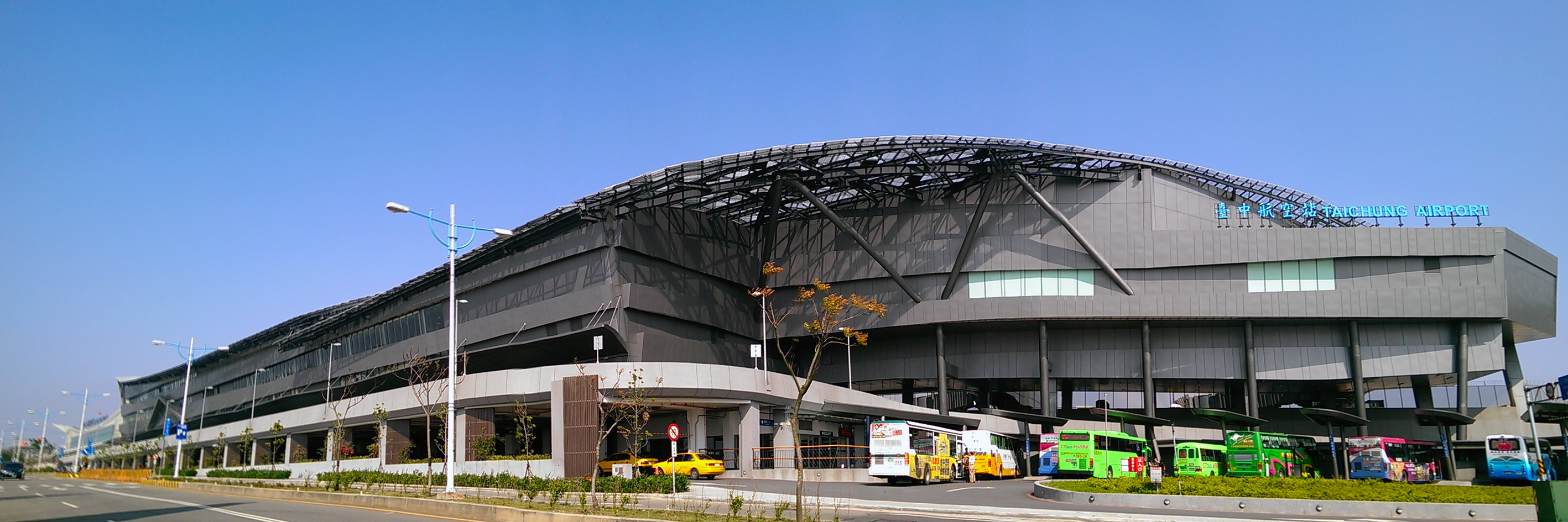 臺中航空站航廈全景